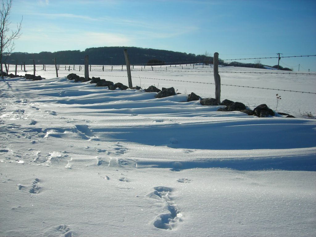 Chemin barré par des congères (Aubrac-France)